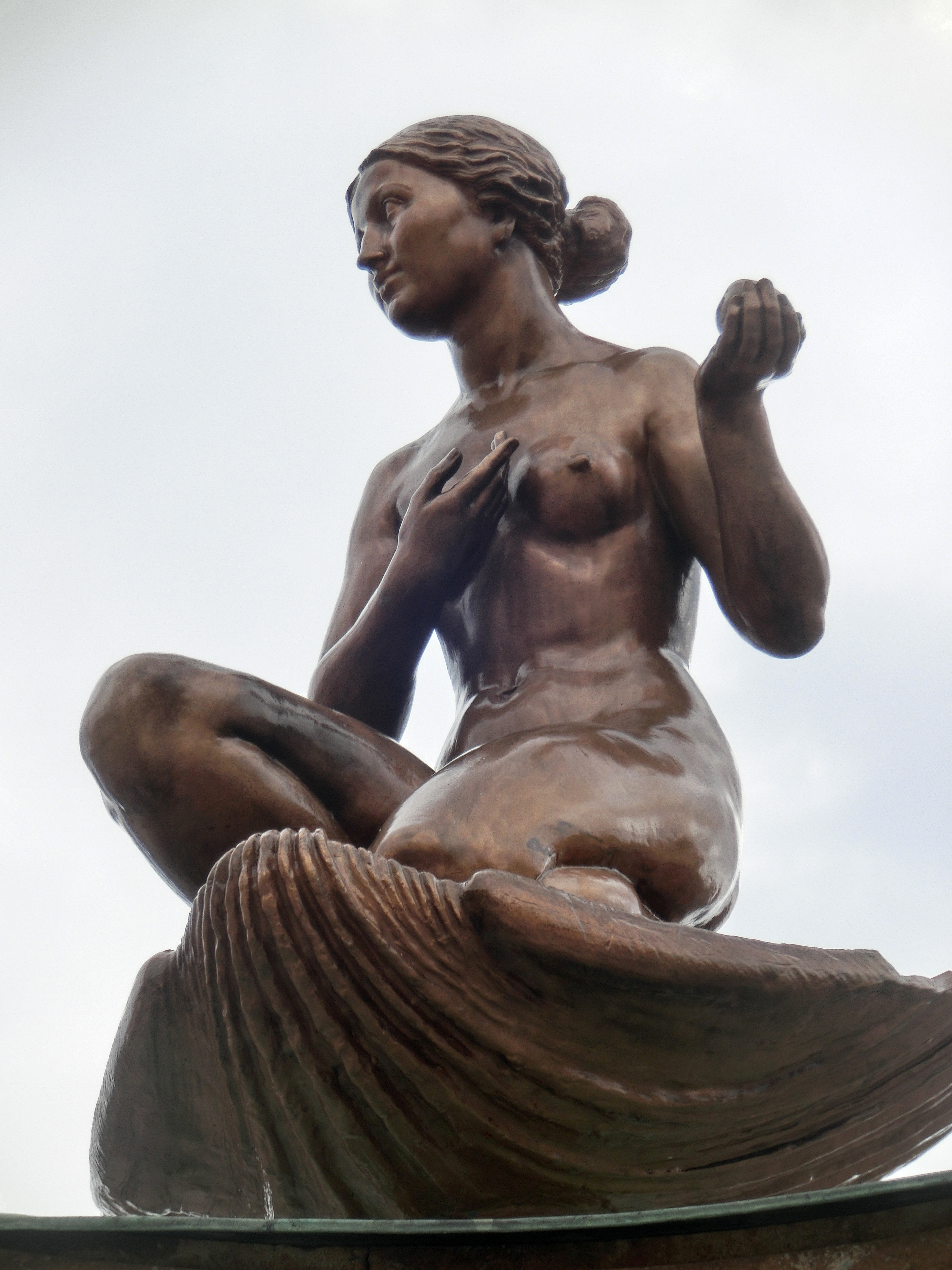 Venus alias Malta-Johanna. Ansgar Almquists bronsskulptur "Venus" från 1931 pryder fontänen av Anders Tengbom på Stora Torget i Falköping, Västergötland, Västra Götalands län, Sverige. I folkmun är hon dock mer känd som "Malta-Johanna".